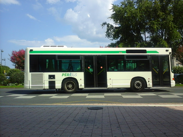 Autobus moyen